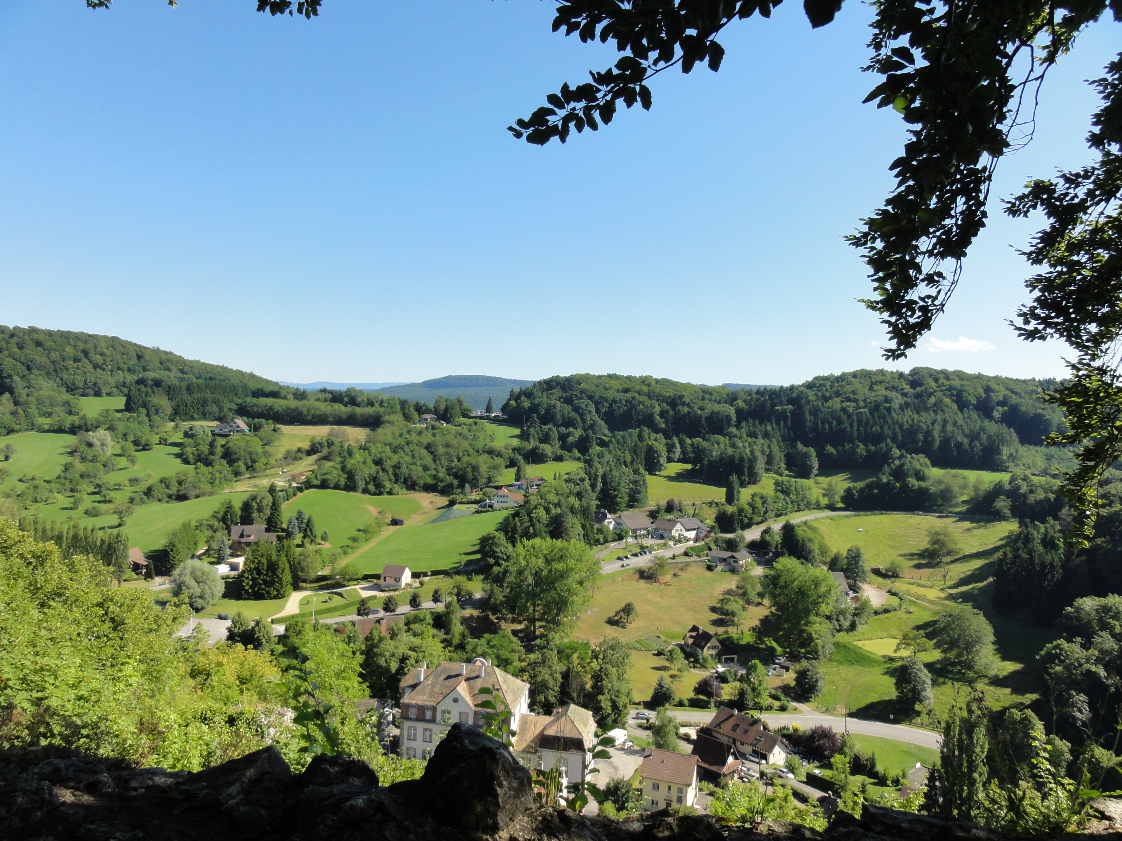 68480 Ferrette, France